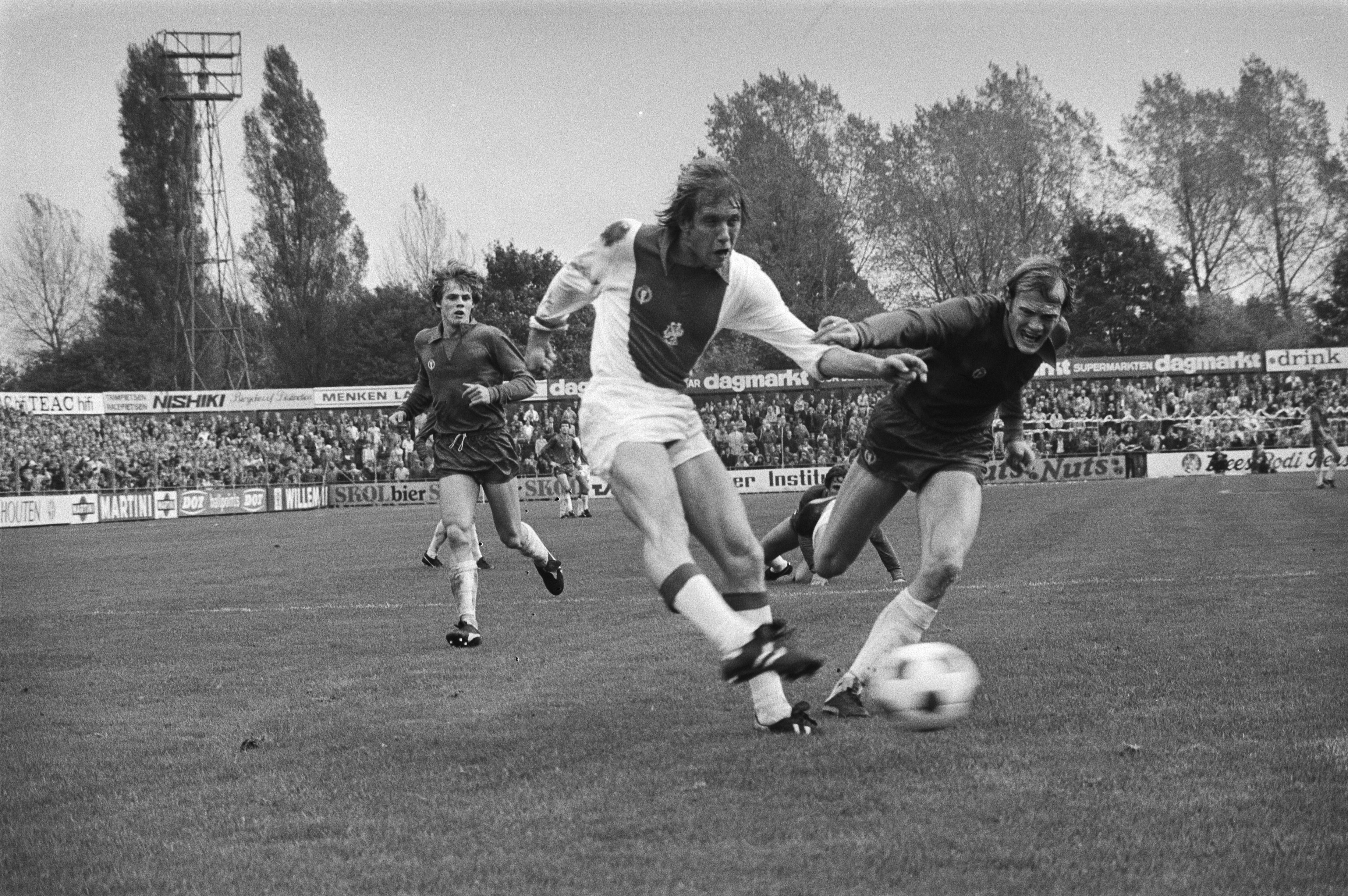 Collectie / Archief : Fotocollectie Anefo Reportage / Serie : Haarlem - Ajax 2-4 (KNVB beker) Beschrijving : Jensen scoort voor Ajax het eerste doelpunt, rechts Huyg van Haarlem Datum : 14 oktober 1979 Locatie : Haarlem, Noord-Holland Trefwoorden : sport, voetbal Persoonsnaam : Huyg, Piet, Jensen, Henning Instellingsnaam : AJAX, KNVB Fotograaf : Suyk, Koen / Anefo Auteursrechthebbende : Nationaal Archief Materiaalsoort : Negatief (zwart/wit) Nummer archiefinventaris : bekijk toegang 2.24.01.05 Bestanddeelnummer : 930-4917